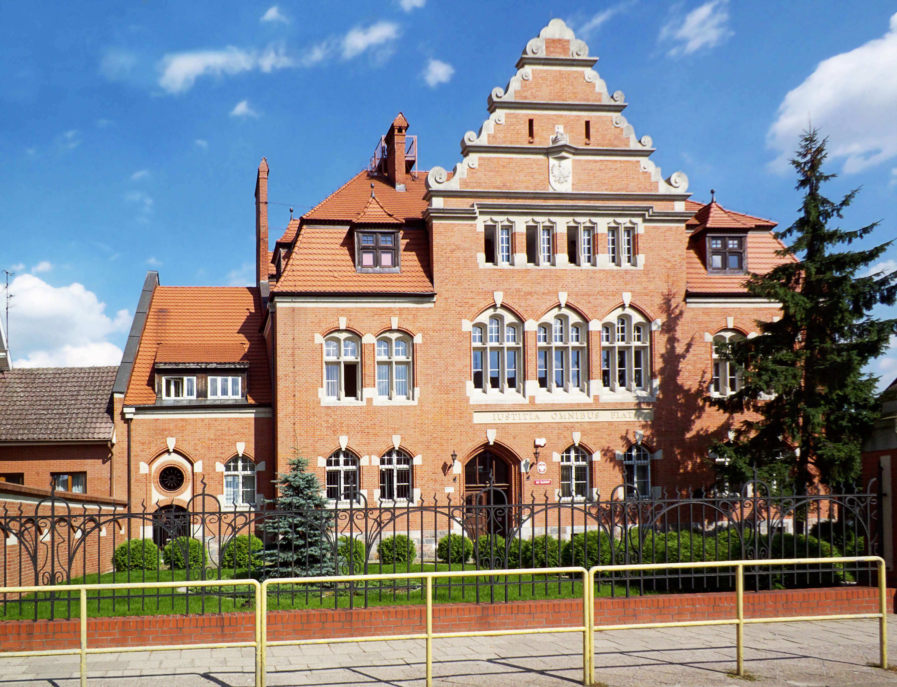 Chodzież, ul. Krasińskiego 10 - dawny Sąd Obwodowy, obecnie Sąd Rejonowy, 1905